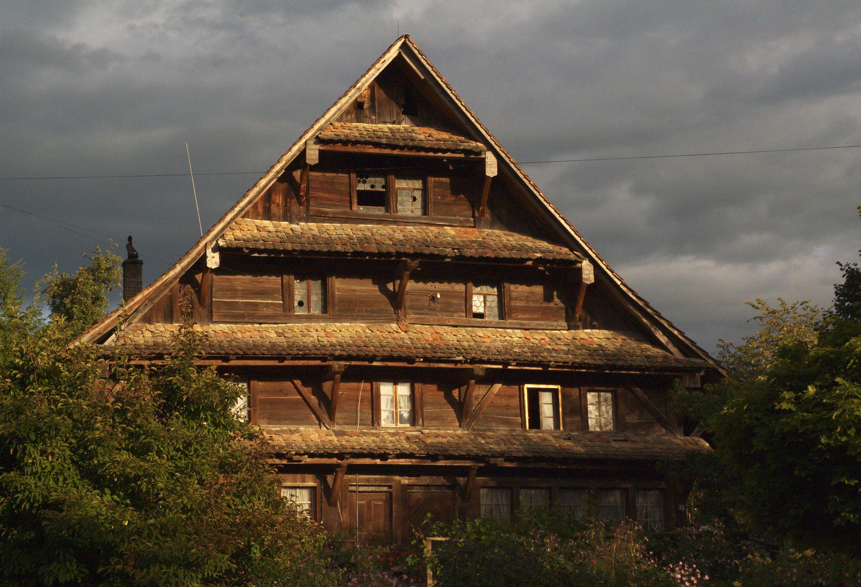 altes Bauernhaus aus Holz, in Rifferswil, Zuger Bauform, mit Klebedächern, Westfassade